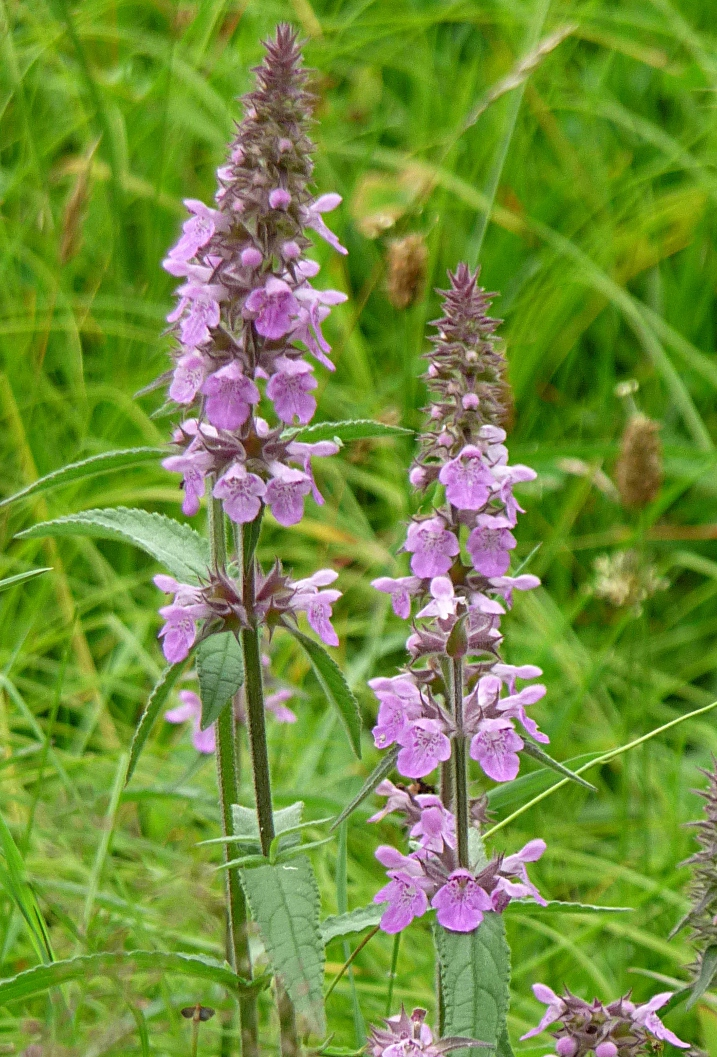 Sumpf-Ziest bei Bärnzell